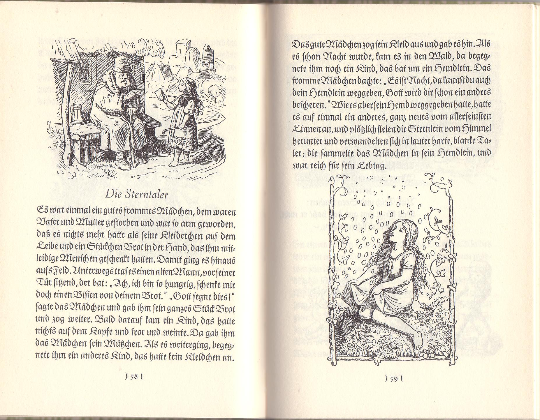 IB 360 Es war einmal (1953), S. 58-59, Schriftart: Gilgengart, Bild: L. Richter († 1884)